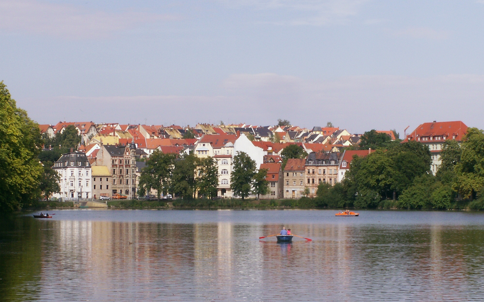 Altenburg Thüringen Stadtzentrum Südansicht Foto 2006 Wolfgang Pehlemann Wiesbaden PICT0305